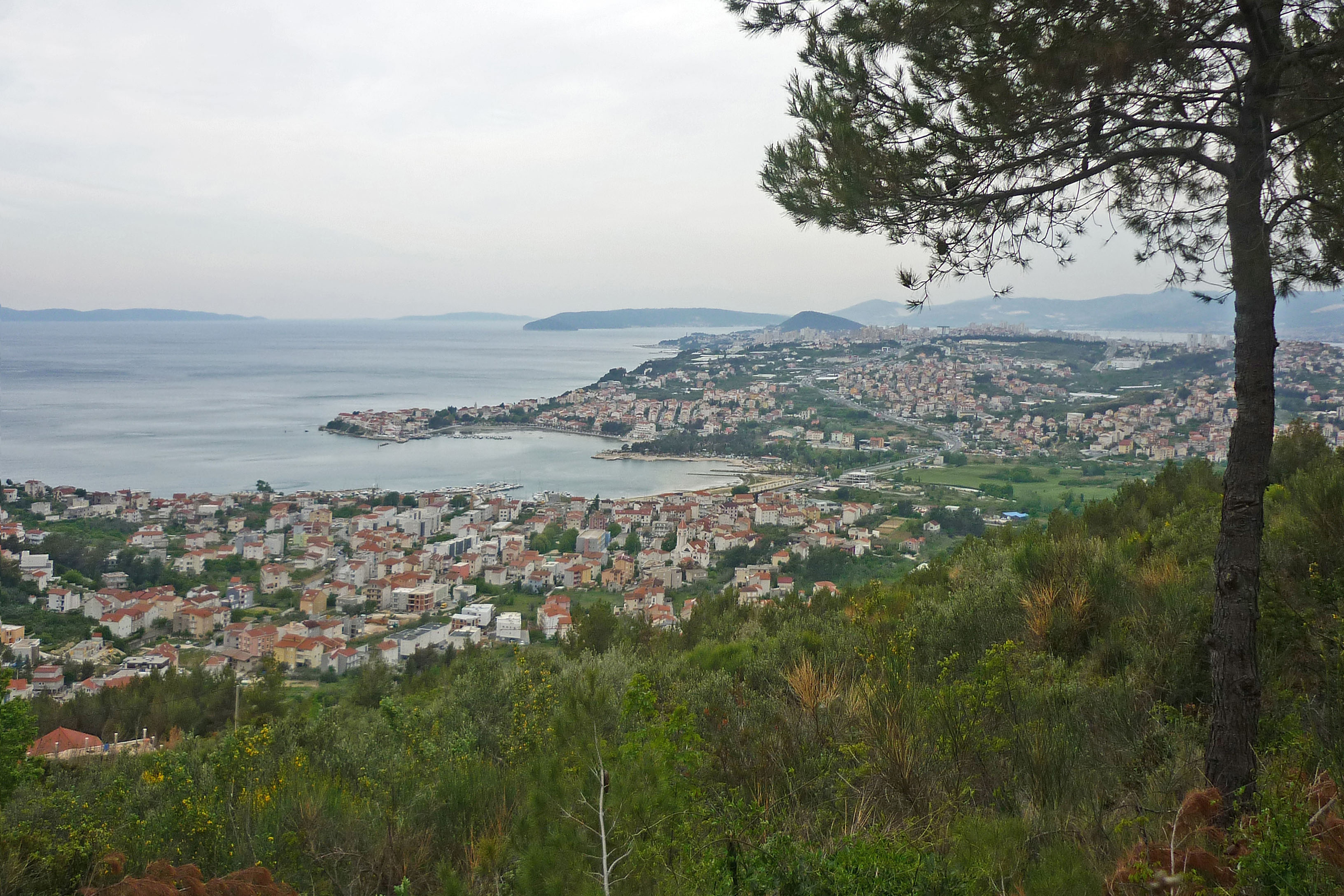 Blick auf Podstrana und Stobreč